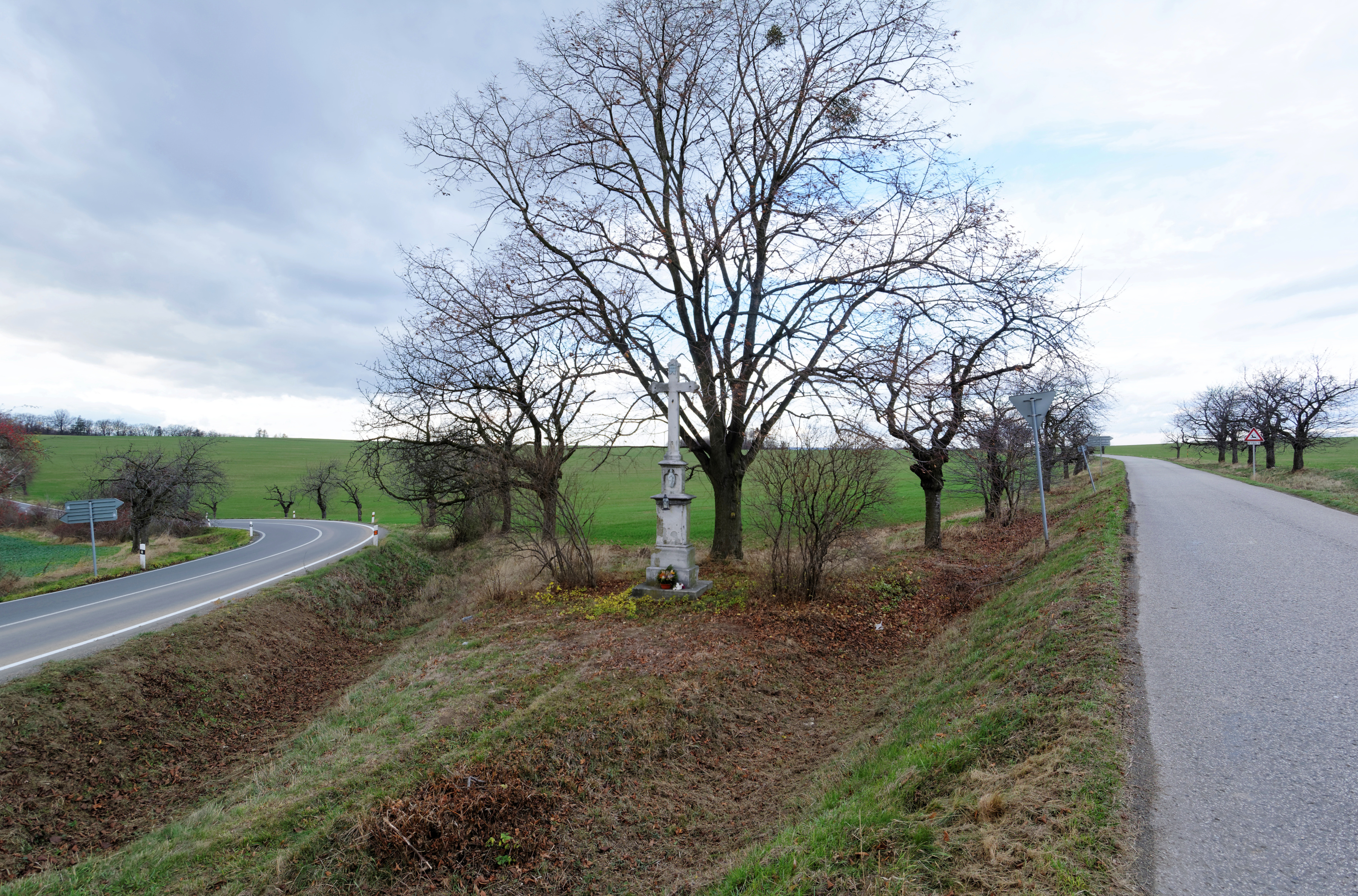 Dobroslavice, křížek na rozcestí silnic III/4673 a III/4678 severně od obce.